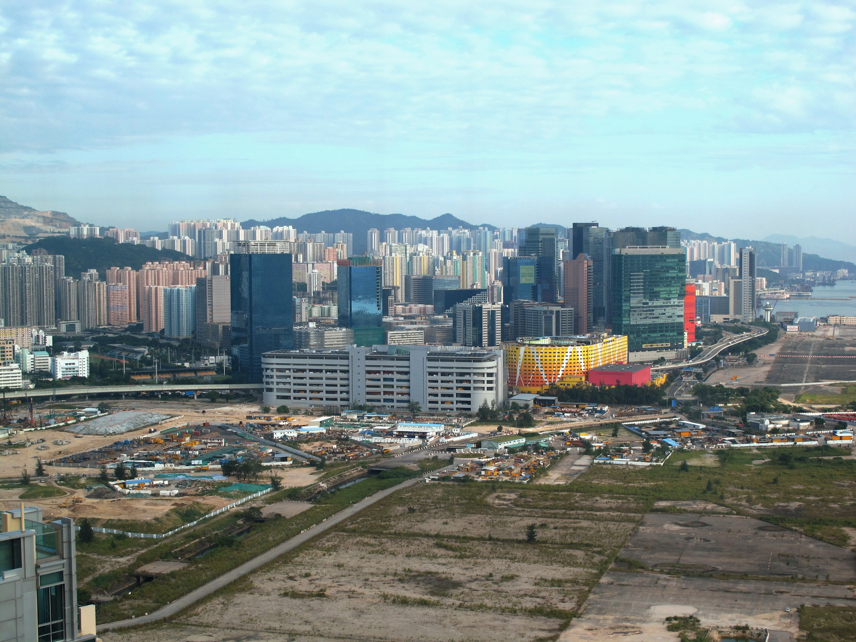 Kowloon Bay Skyline in 2010 九龍灣